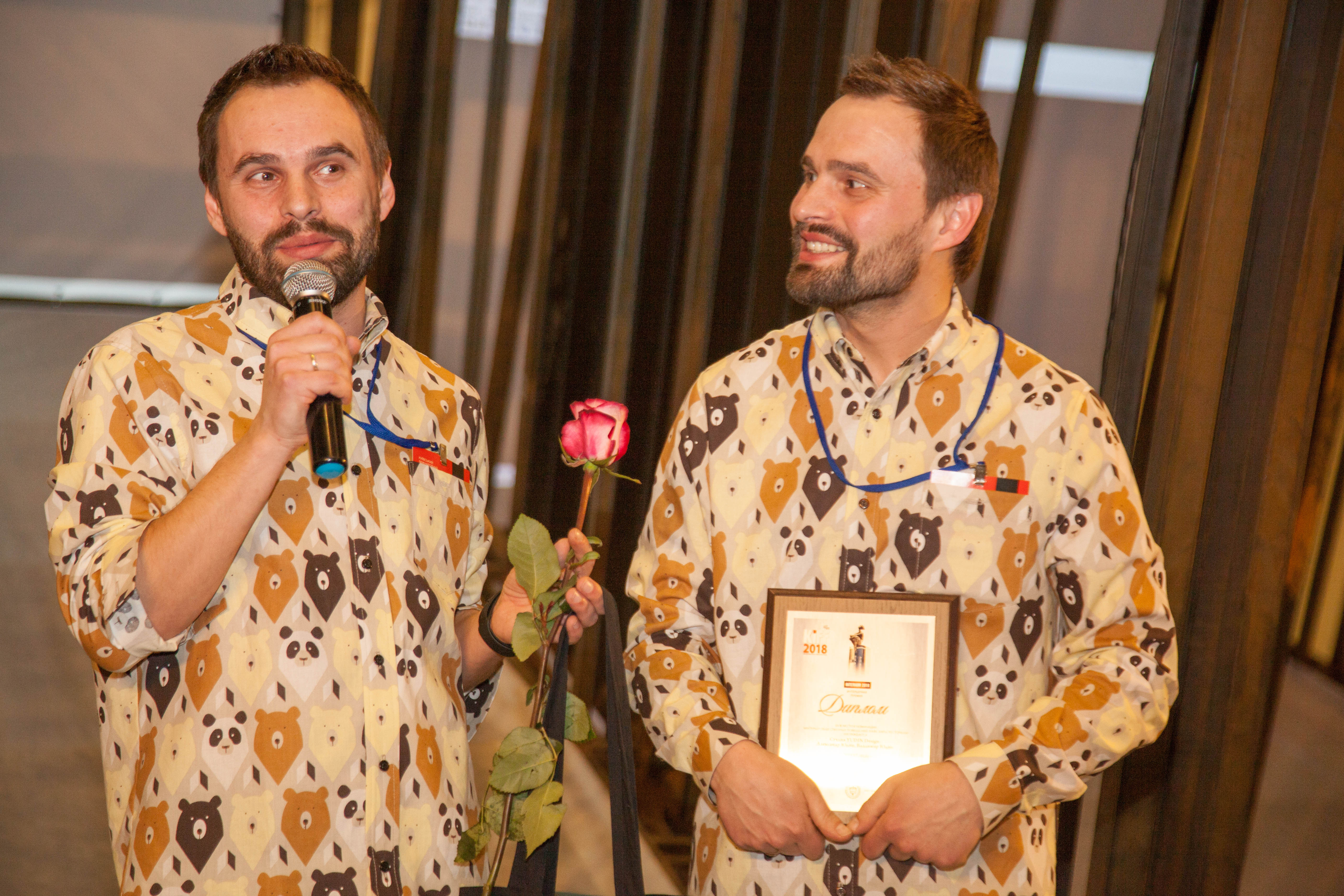 Володимир та Александр Юдіни_Нагородження Інтеріум